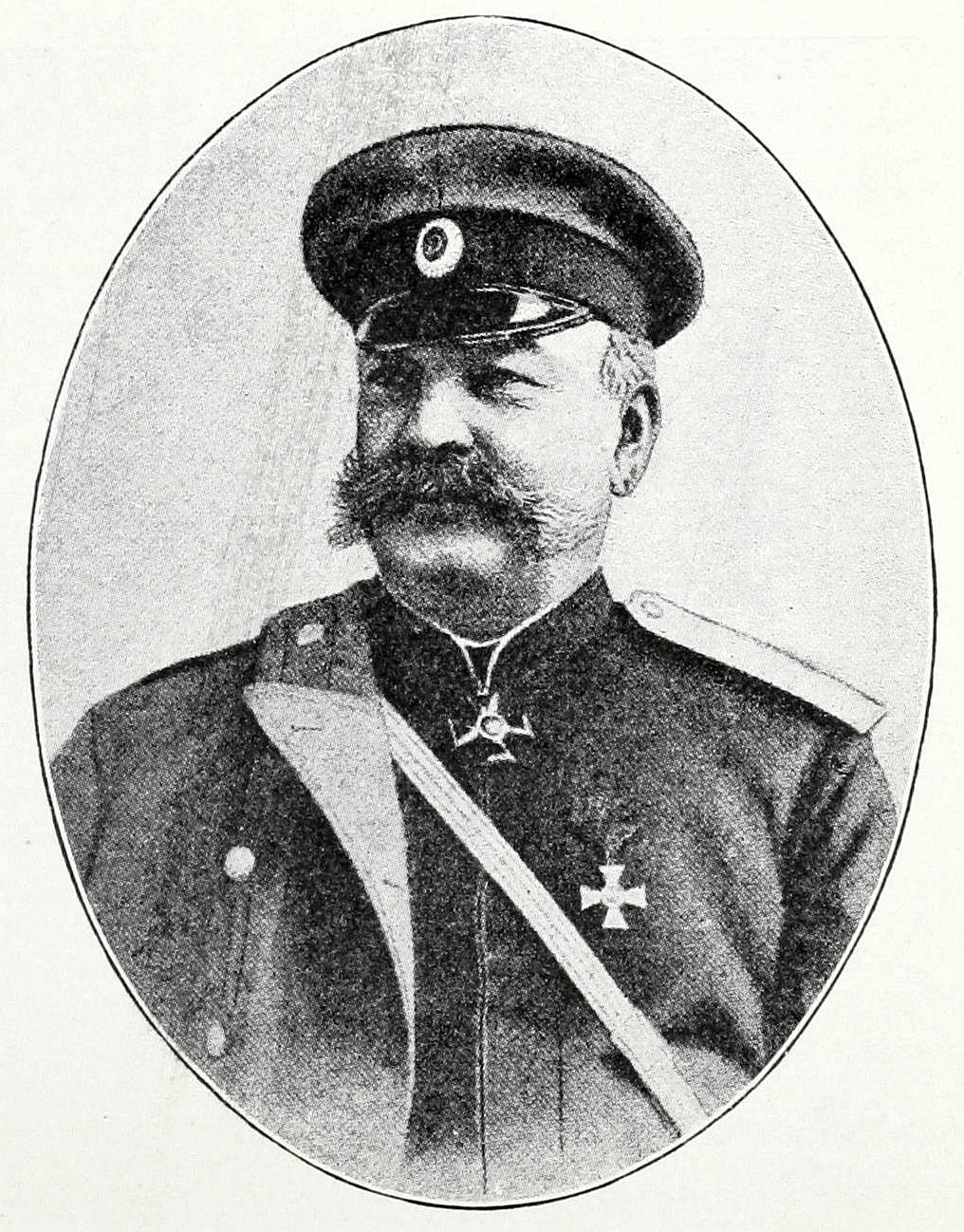 Это изо было использовано в статье «Греков, Митрофан Ильич» опубликованной в восьмом томе «Военной энциклопедии», который был издан книгоиздательским товариществом И. Д. Сытина в 1912 году в столице Российской империи городе Санкт-Петербурге.